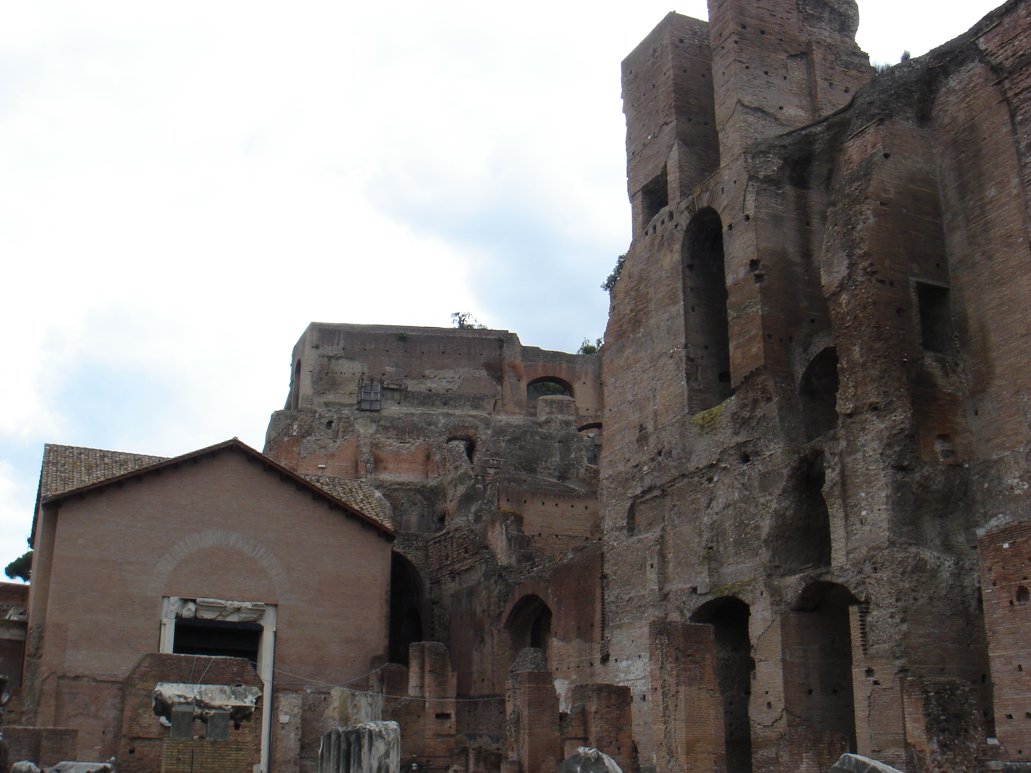 Roma, Foro romano: Palatino e Santa Maria Antiqua.